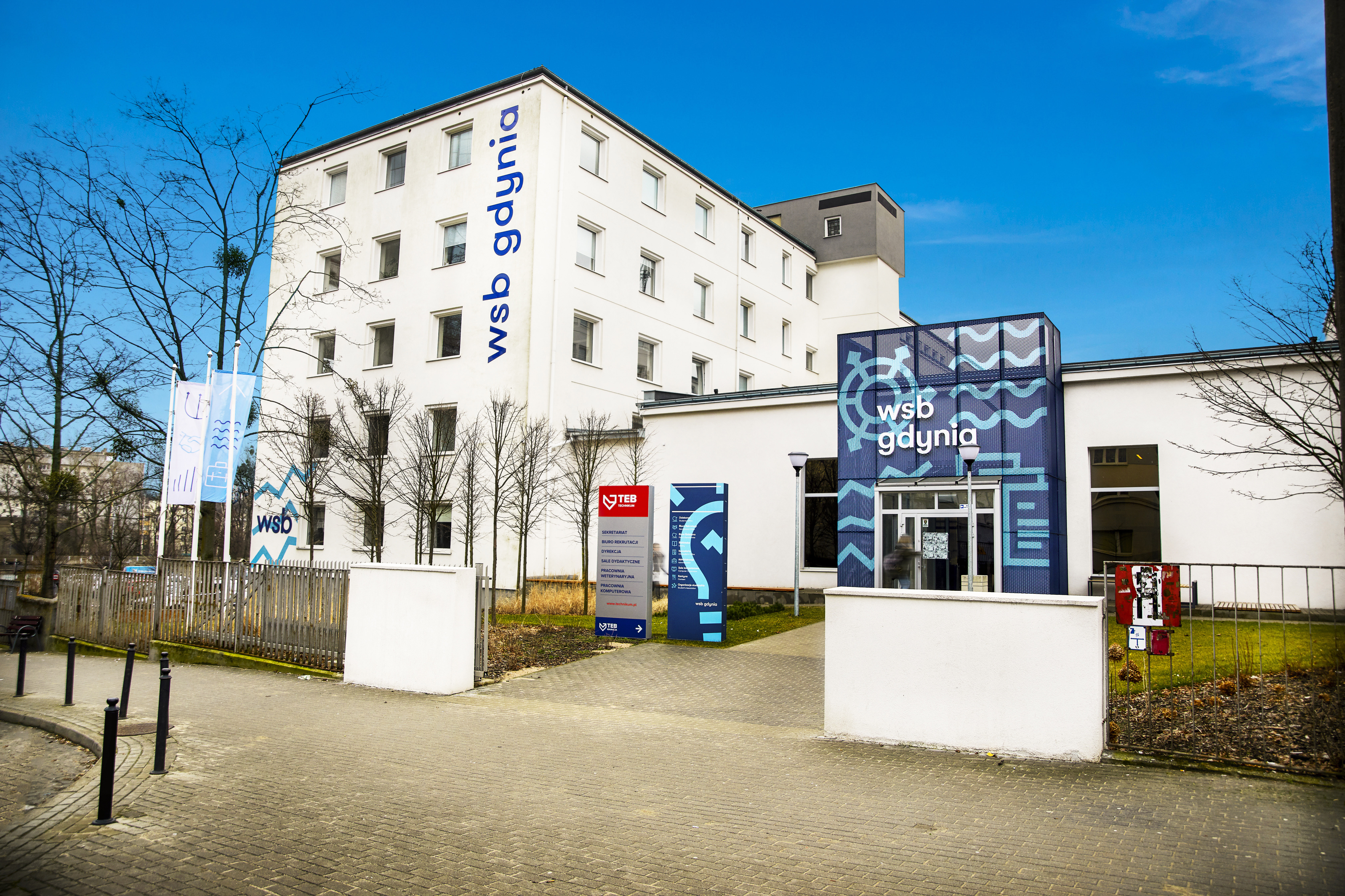 Budynek WSB w Gdyni